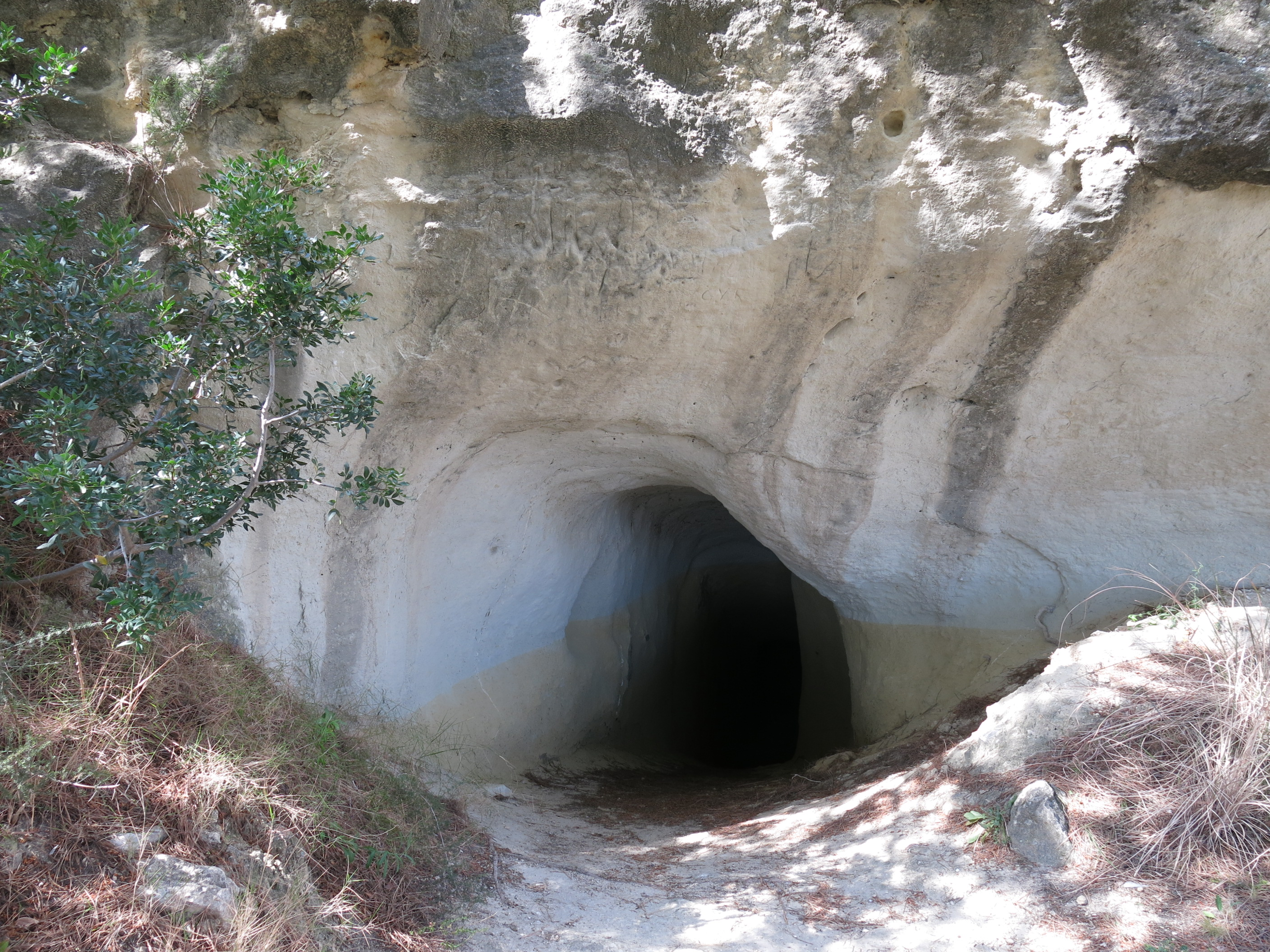 Castell de Vespella (Vespella de Gaià)